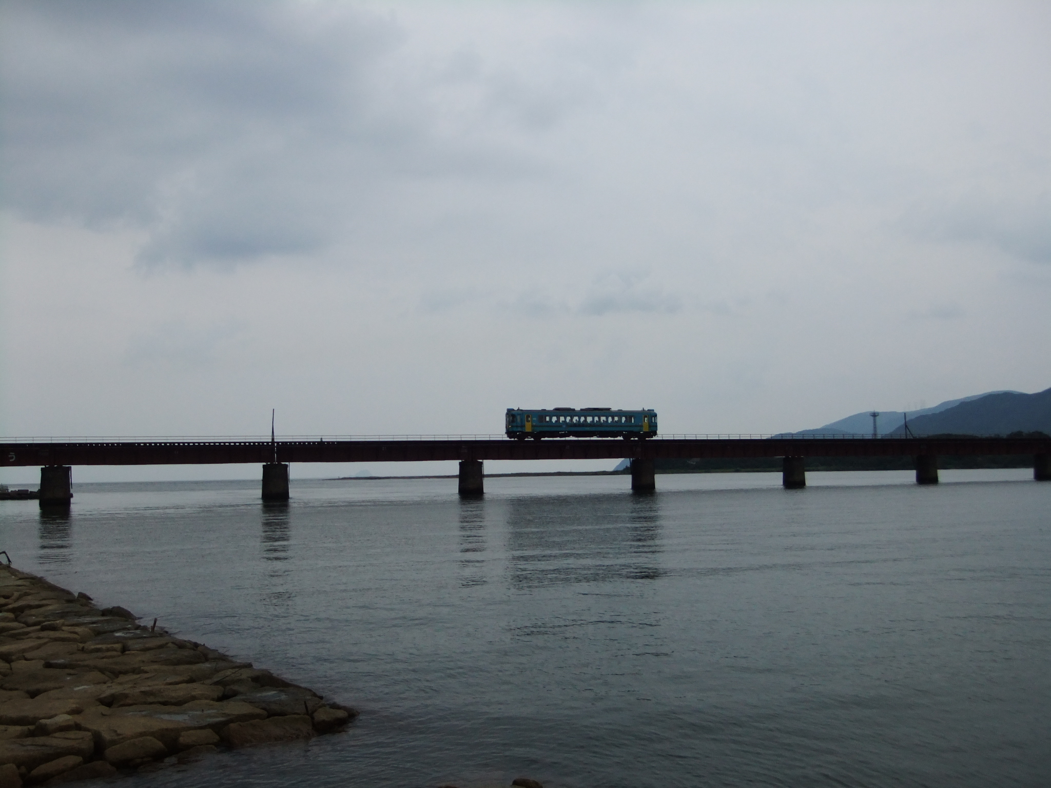 京都丹後鉄道 由良川橋梁